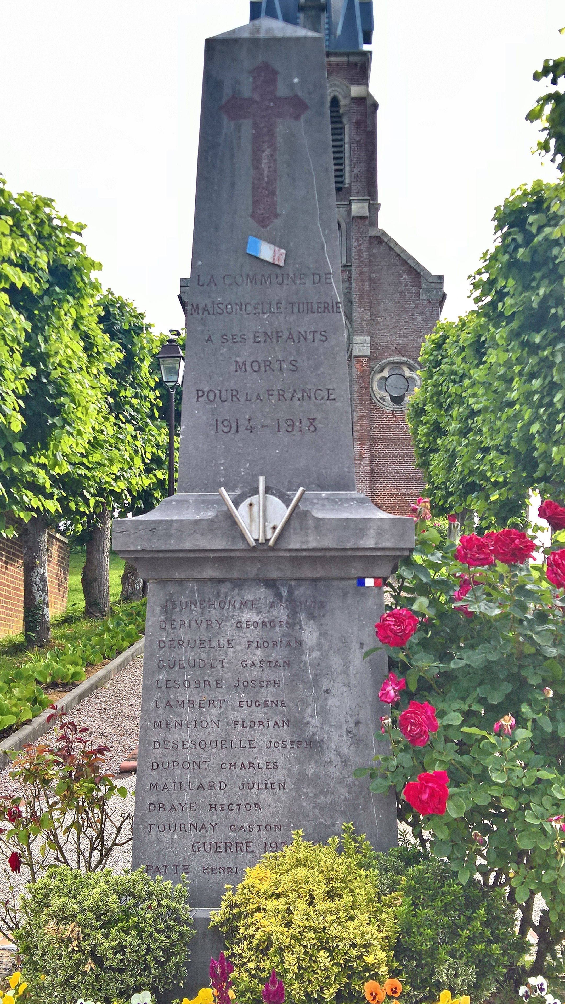 Maisoncelle-Tuilerie : Le monument aux morts